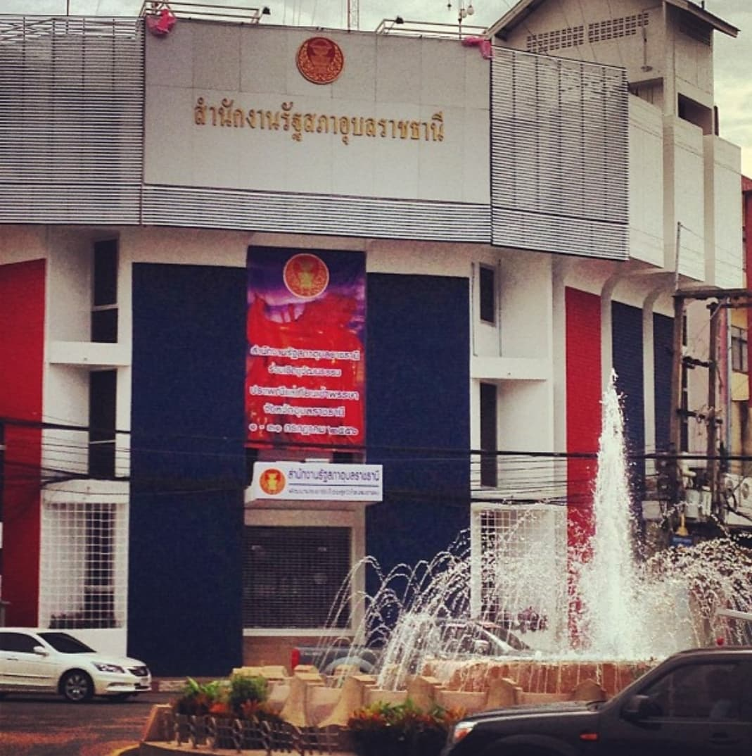 วงเวียนน้ำพุอุบลราชธานี